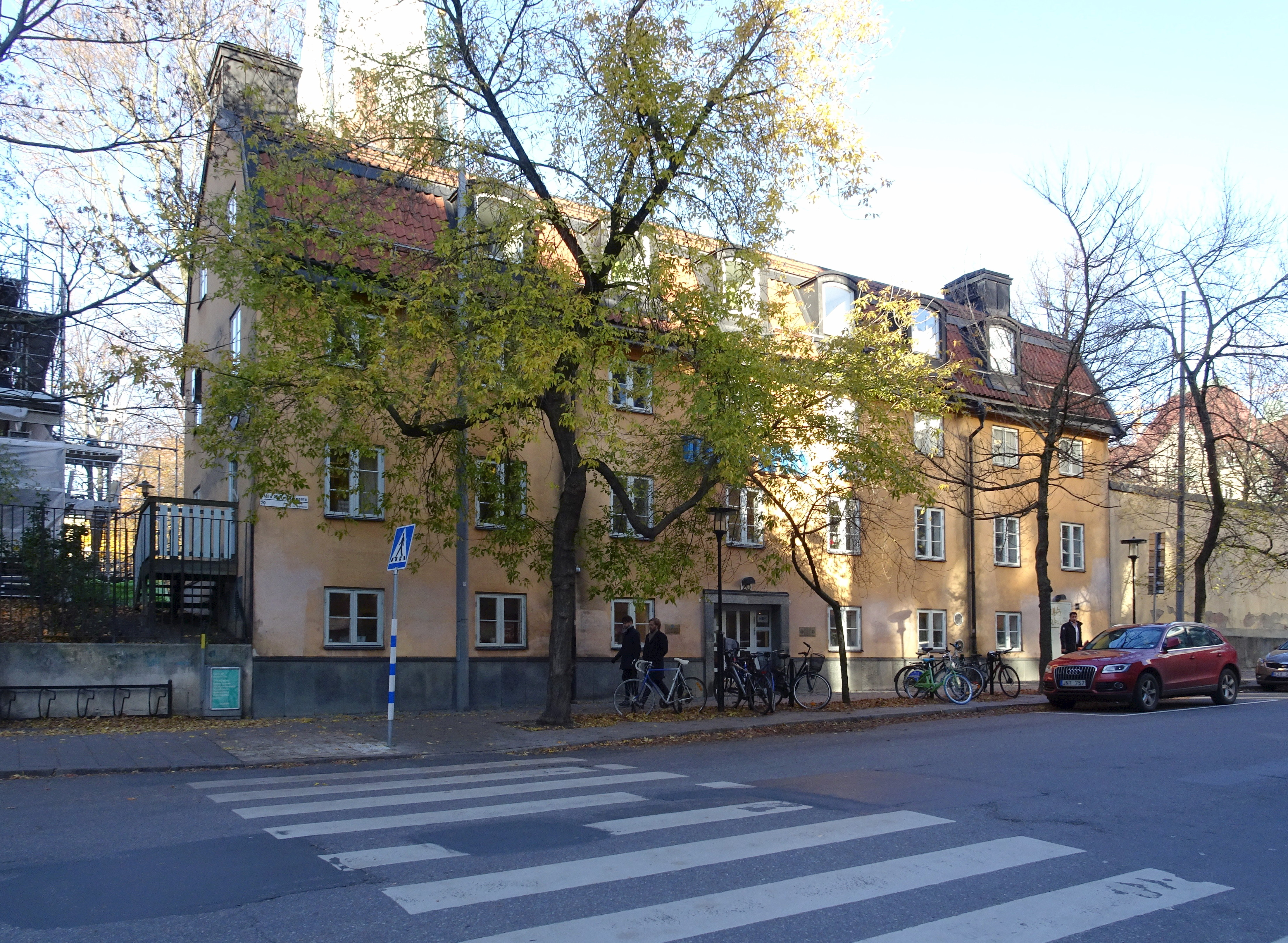 Orgelpipan 9 (Klara kyrkas kanslibyggnad), Klara södra kyrkogata 20, uppfördes 1983–1986, arkitekt Lennart Nilsson, Tegnér Arkitektgrupp AB